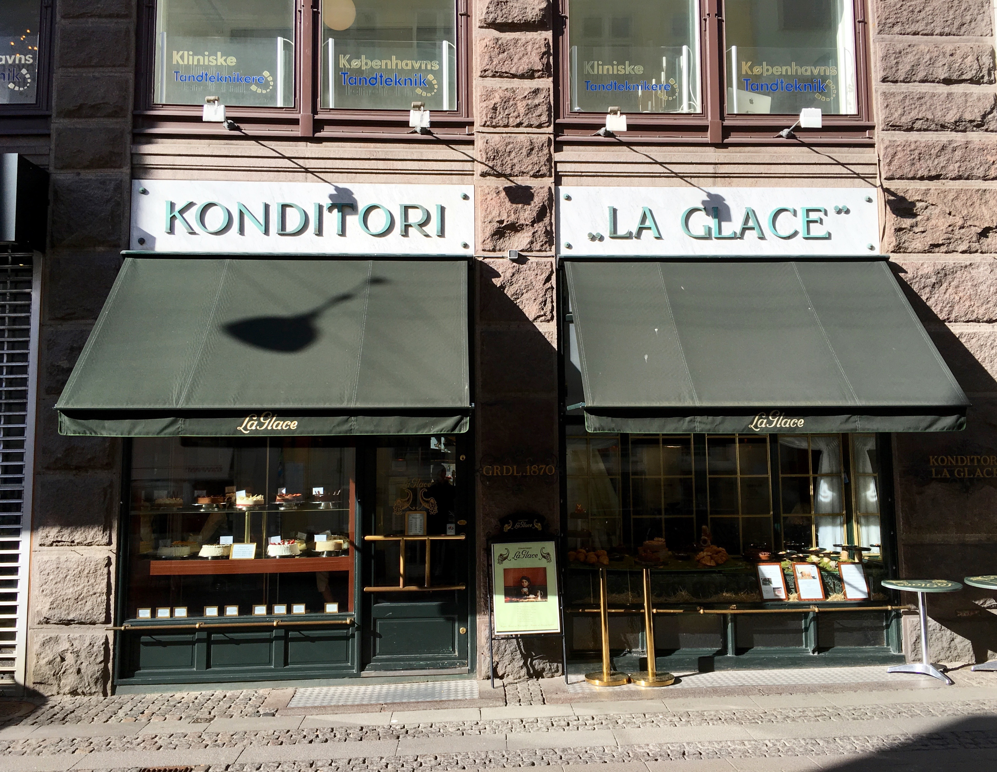 Konditori La Glace, København